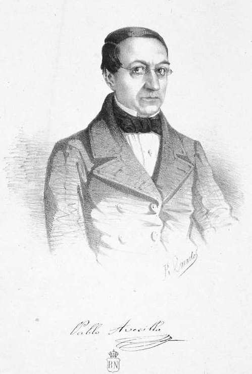 Pablo Avecilla, grabado de Rufino Casado para la serie de la Sociedad Literaria: Asamblea Constituyente de 1854. Biblioteca Nacional de España.